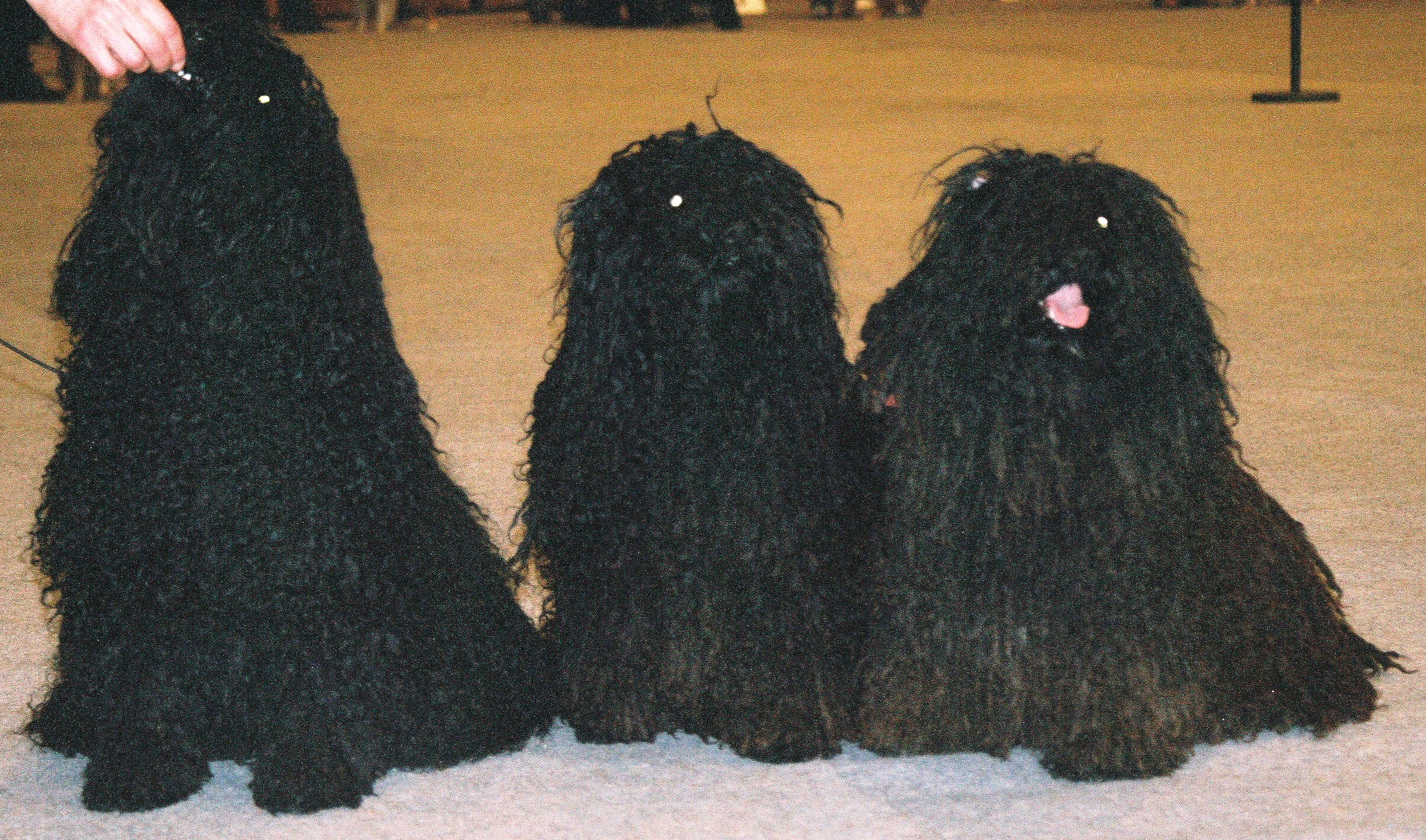 autor: Pleple2000 22:16, 5 April 2006 (UTC)